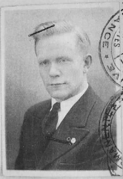 Nils Olof Lätt ou Nisse Lätt, né le 30 décembre 1907 à Kjulaås et mort le 14 janvier 1988 à Göteborg, est un militant anarcho-syndicaliste suédois.